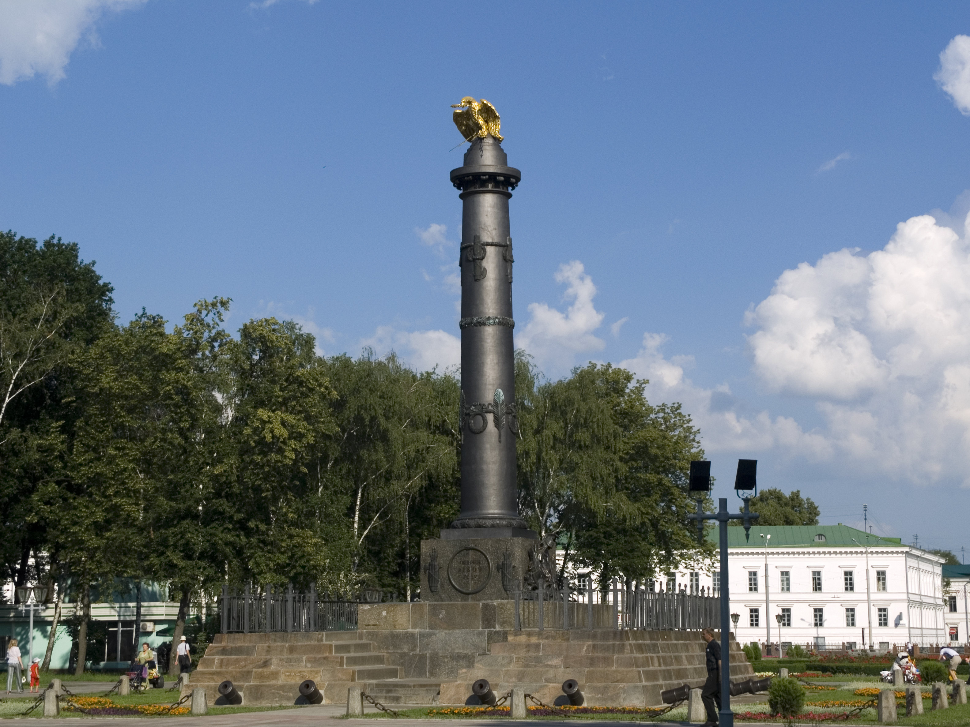 Україна, Полтава - Пам'ятник на честь 100 річниці Полтавської битви у Корпусному саді